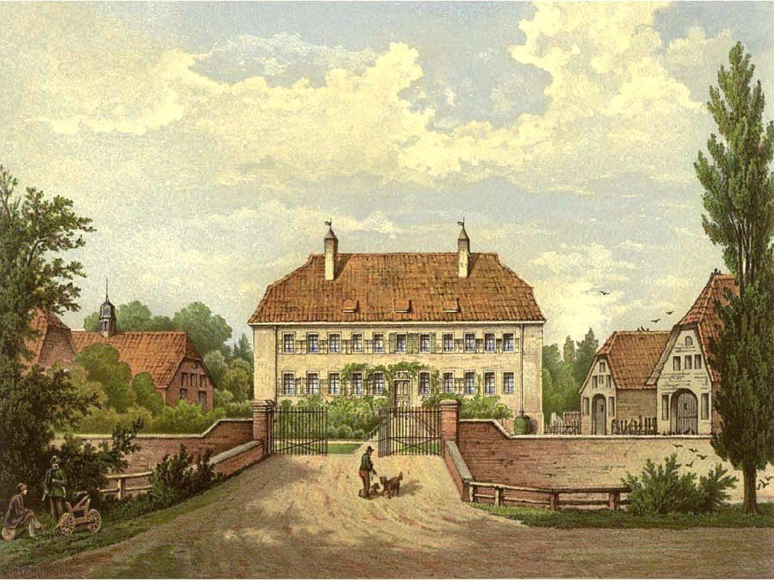 Haus Venne, Kreis Lüdinghausen, Provinz Westphalen